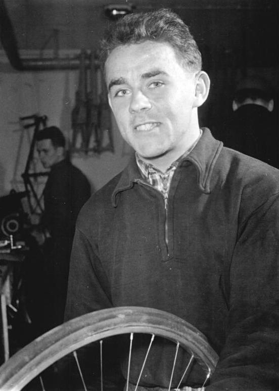 Günter Grünwald Zentralbild Funck-Wendorf 17.4.56 Friedensfahrt-Kandidaten im Trainingslager Die Friedensfahrt-Kandidaten der DDR befinden sich seit Montag, dem 16.4.1956, in der Deutschen Hochschule für Körperkultur und Sport in Leipzig im Trainingslager, um sich auf die diesjährige Friedensfahrt Warschau-Berlin-Prag vorzubereiten. UBz: Der Friedensfahrt-Kandidat Günter Grünwald (DHfK Leipzig).